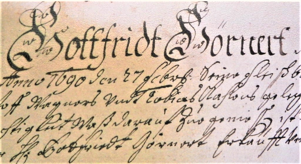 Der Name Gernert wird im Arnauer Stadtbuch um 1690 in Görnert umgeändert, schlesisch-sächsischer Einfluß im Familiennamen. Ein Teil der Stadtsenatoren und Bürger exulierten nach Sachsen und Schlesien, die Namen wurde dort anders geschrieben.